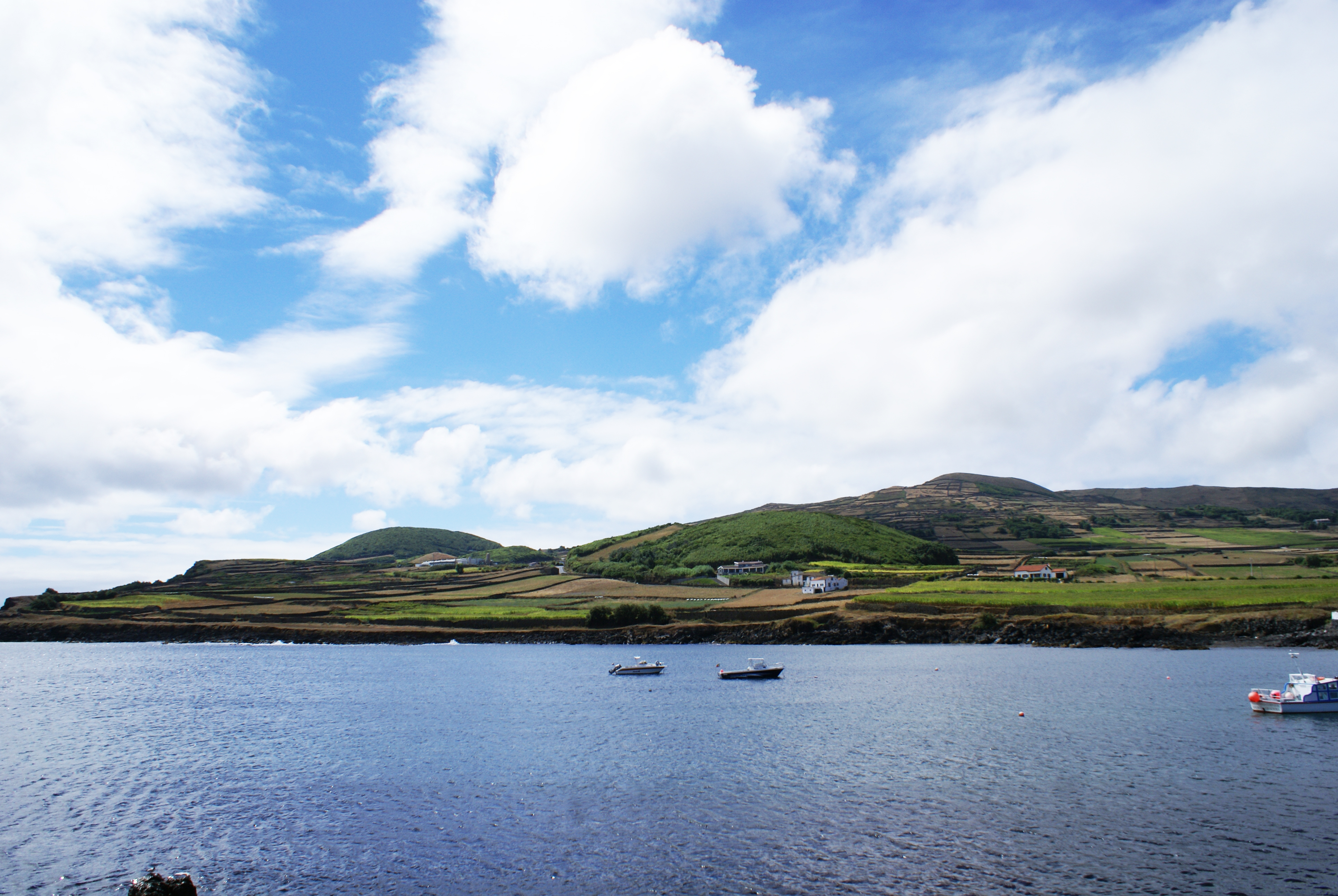 Baía da Barra, Santa Cruz da Graciosa, ilha Graciosa, Açores, Portugal